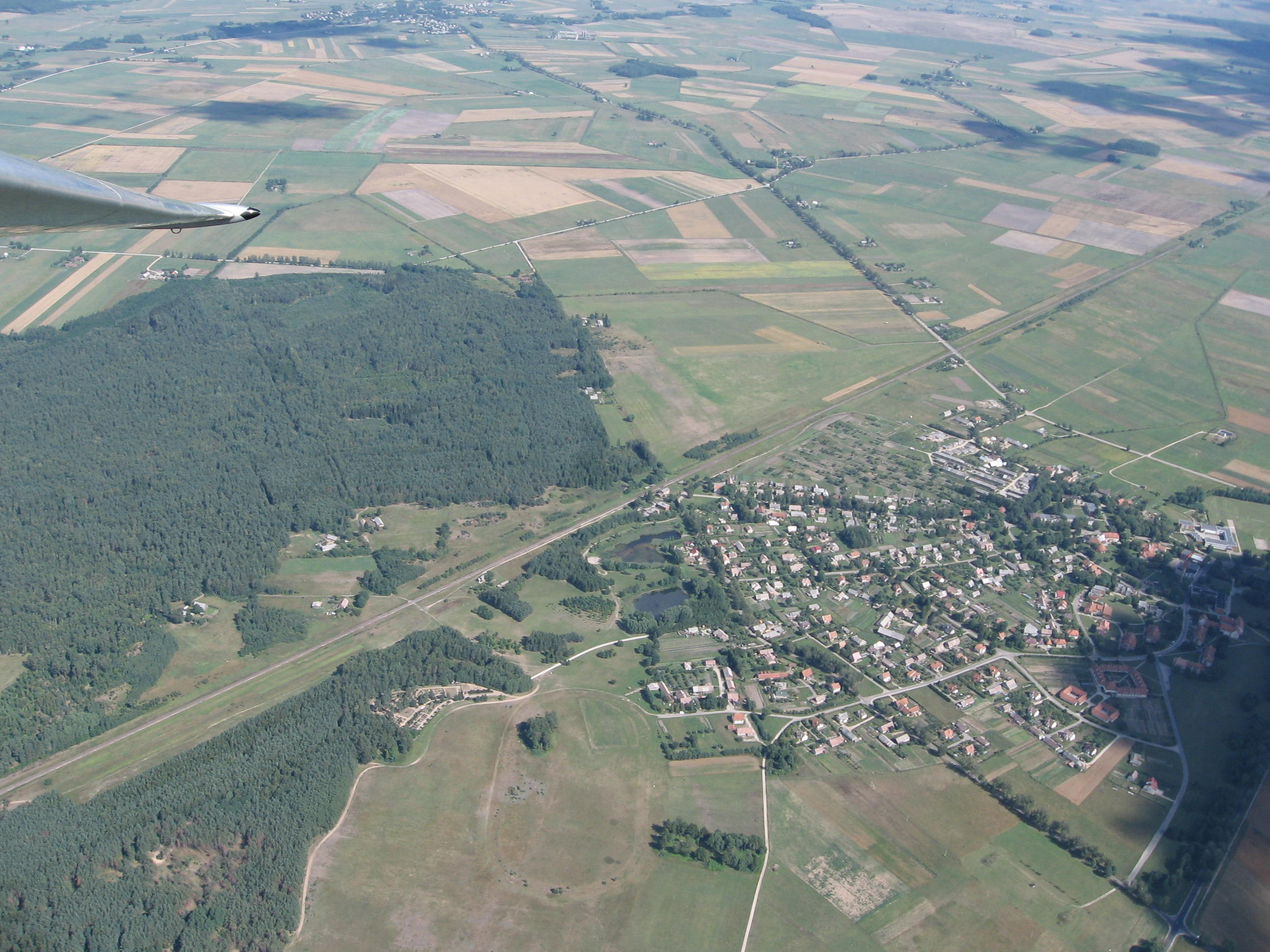 Juknaičiai